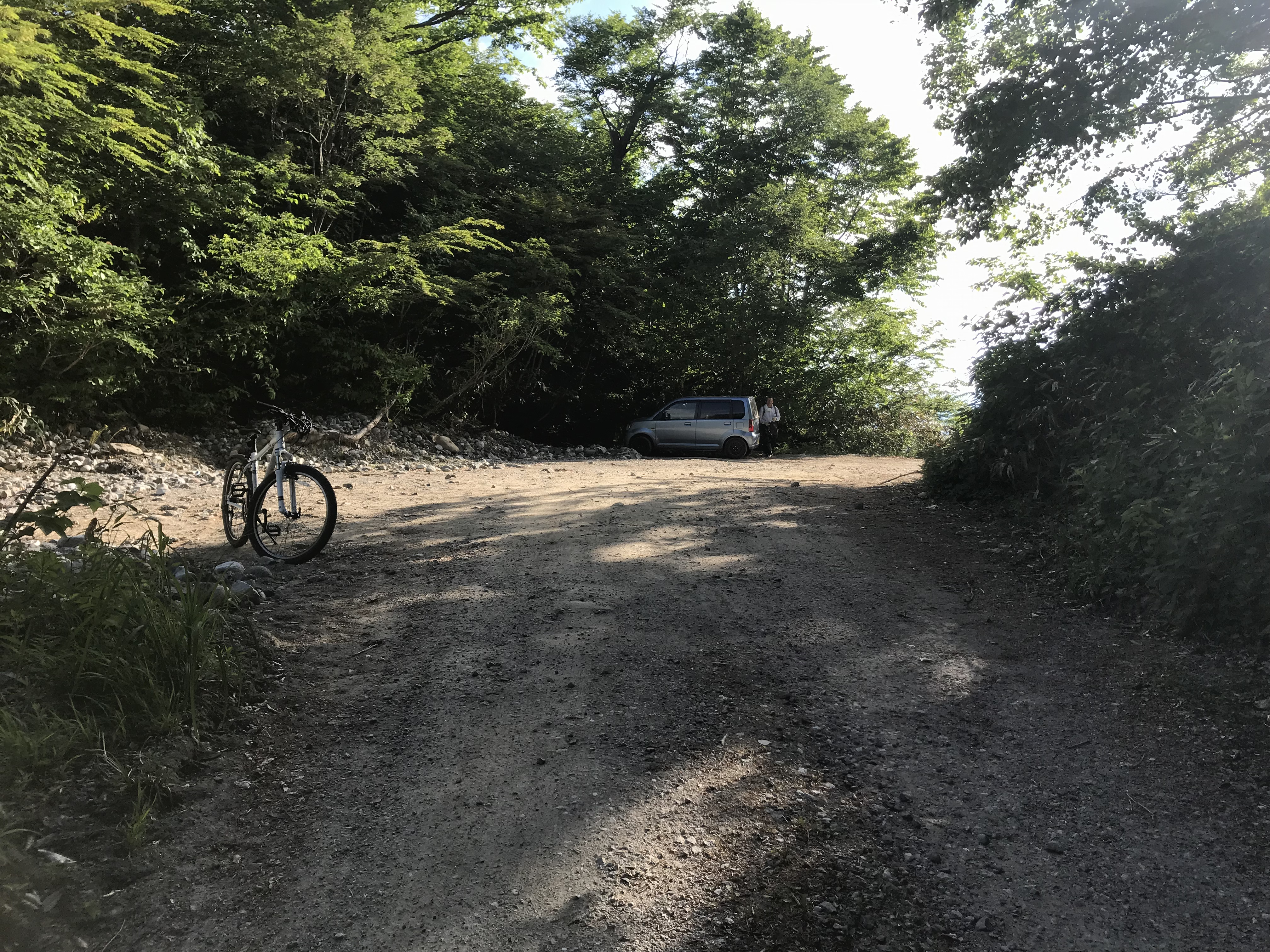 茂住峠です